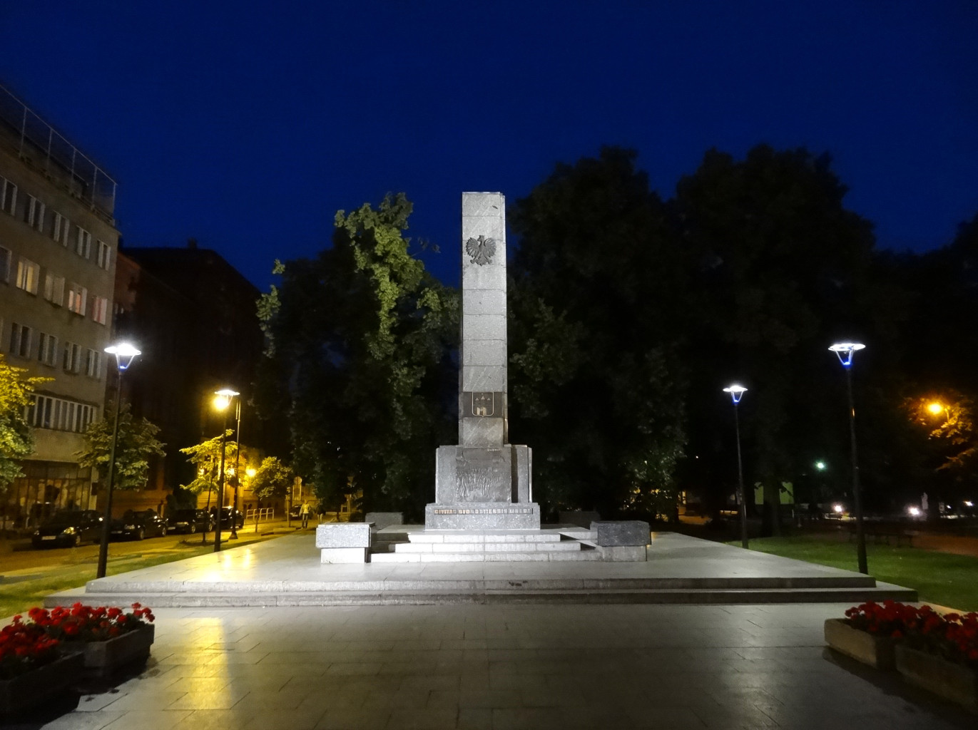 Pomnik Wolności w Bydgoszczy (1945, Jan Kossowski) zlokalizowany na placu Wolności